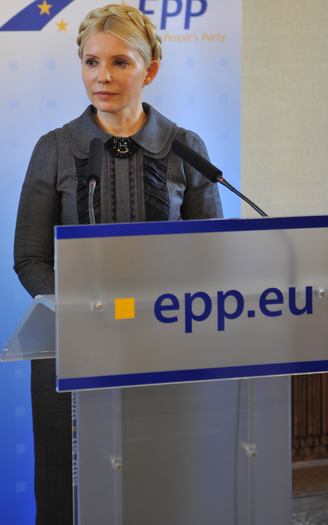 Yulia Tymoshenko